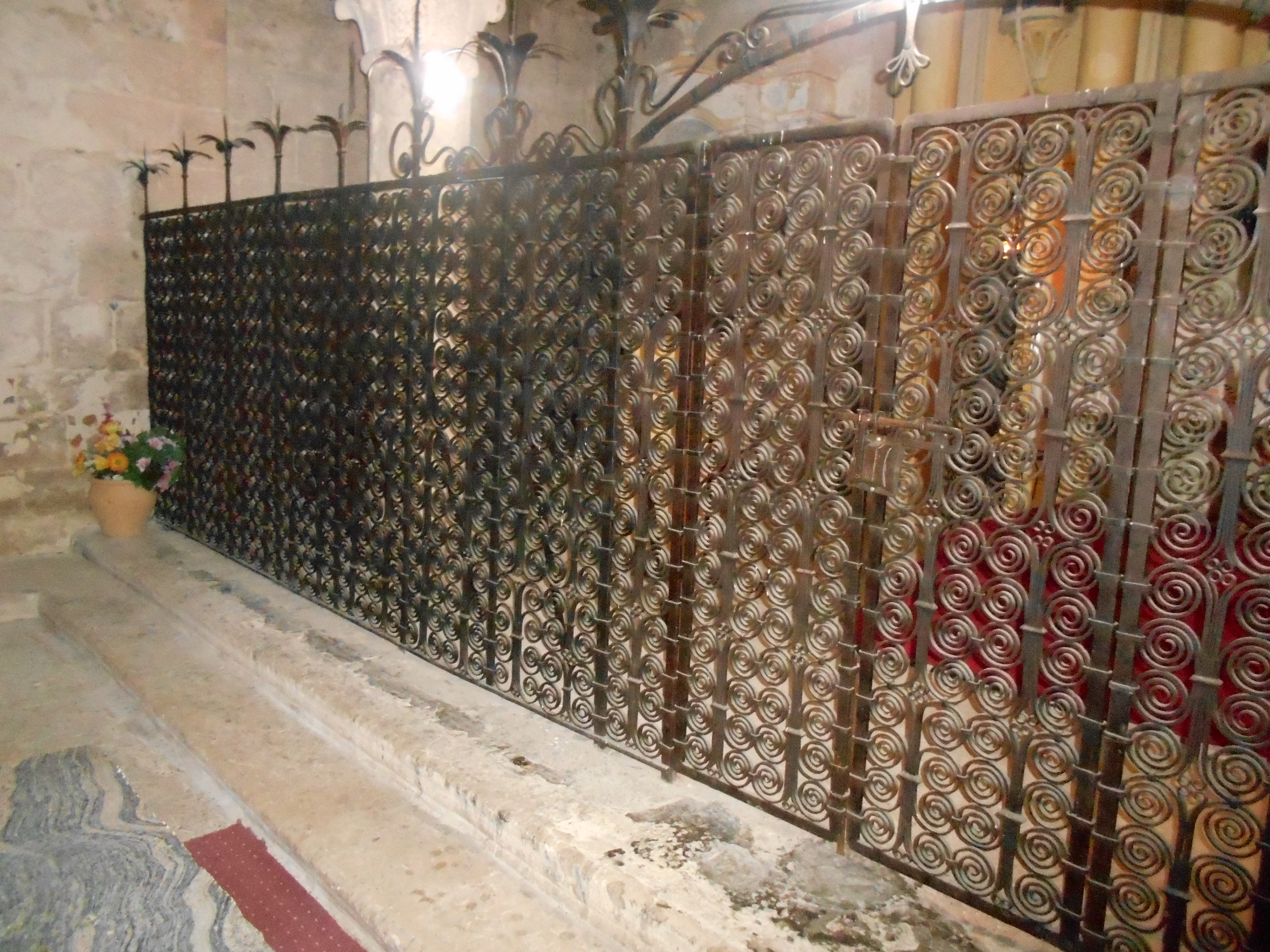 Interior de Santa Maria de Costoja